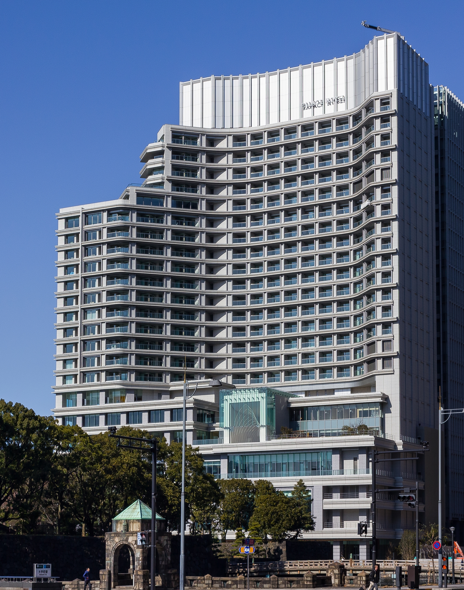 パレスホテル（東京都千代田区）